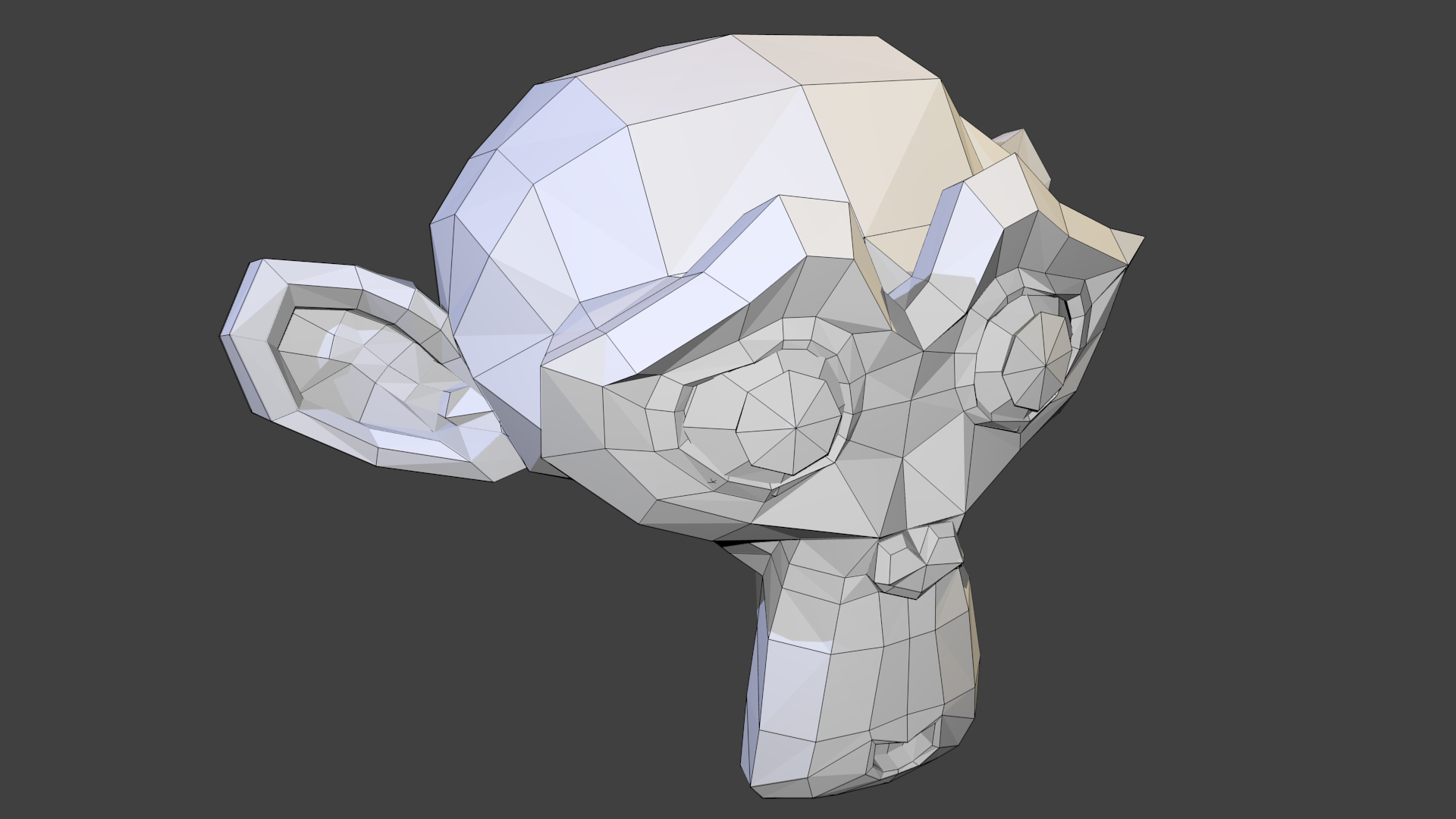 Suzanne, Mesh-Grundmodel (primitive) aus dem 3D-Programm Blender